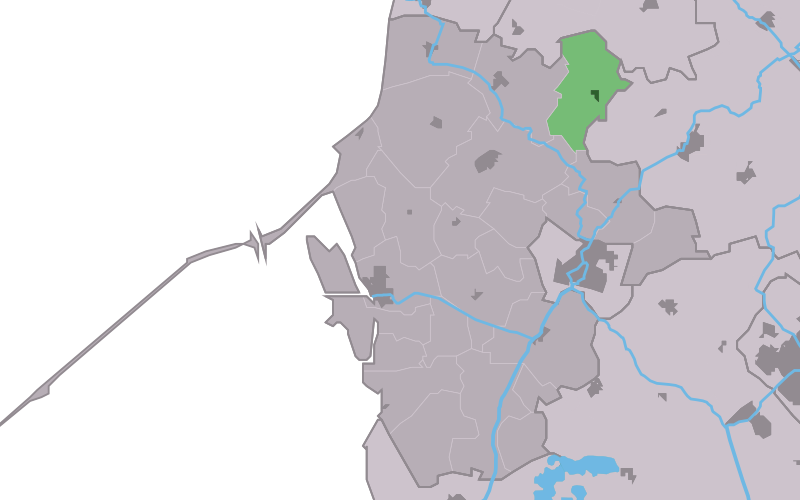 Kaartsje fan himrik fan Lollum